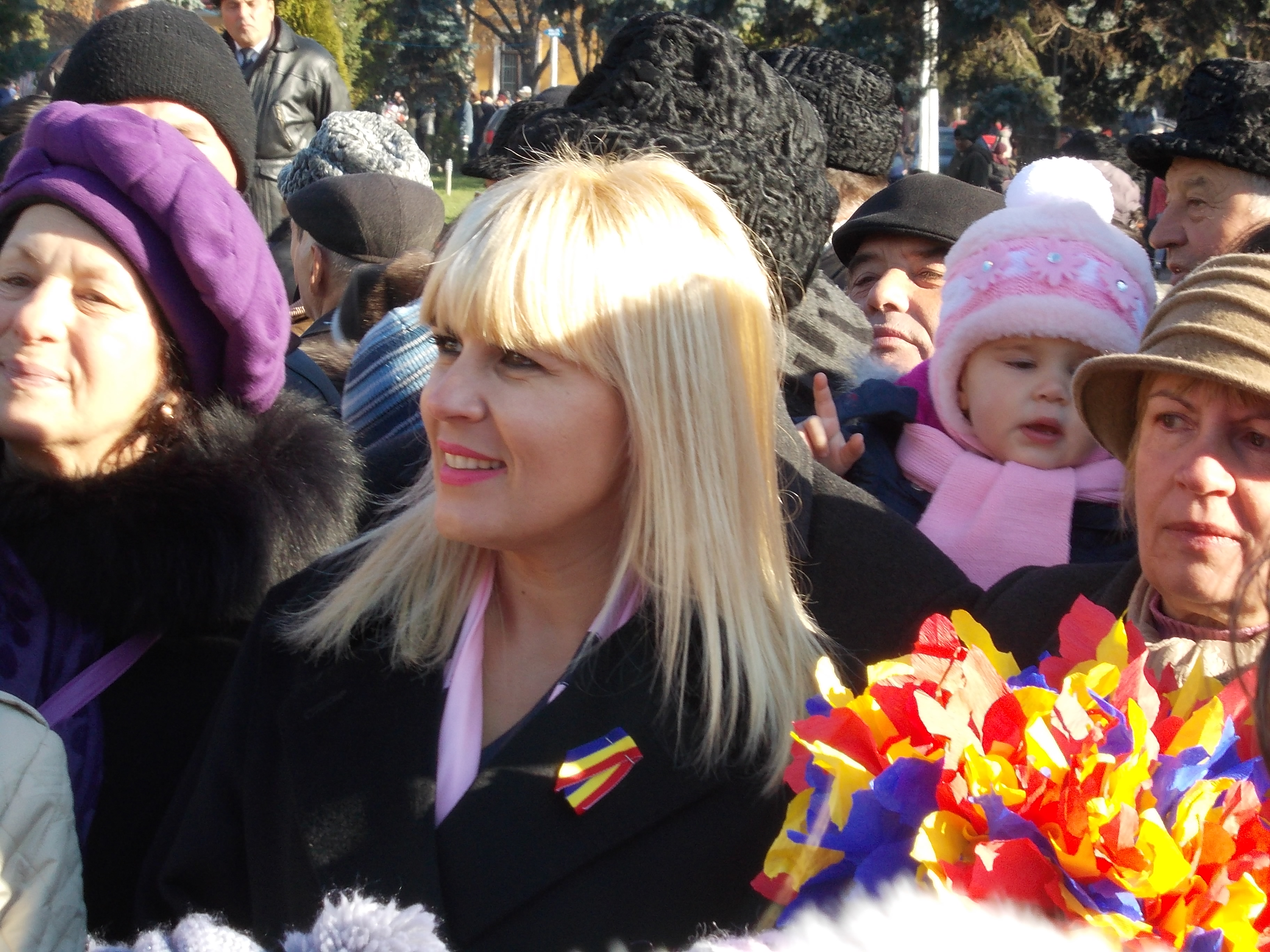 Elena Udrea la Roman cu ocazia Zilei Naţionale